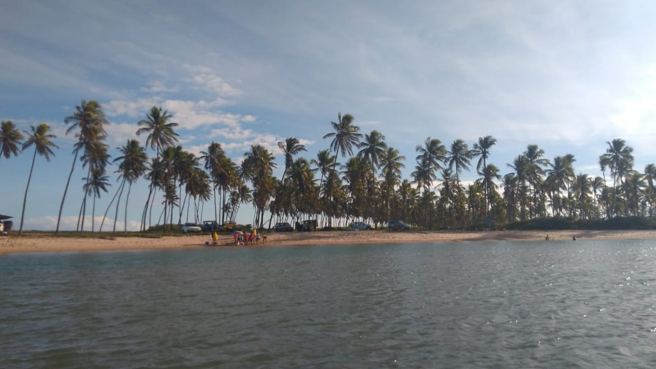 Praia de Barra do Jacuípe, localizada na costa da cidade baiana de Camaçari, Região Metropolitana de Salvador (RMS)